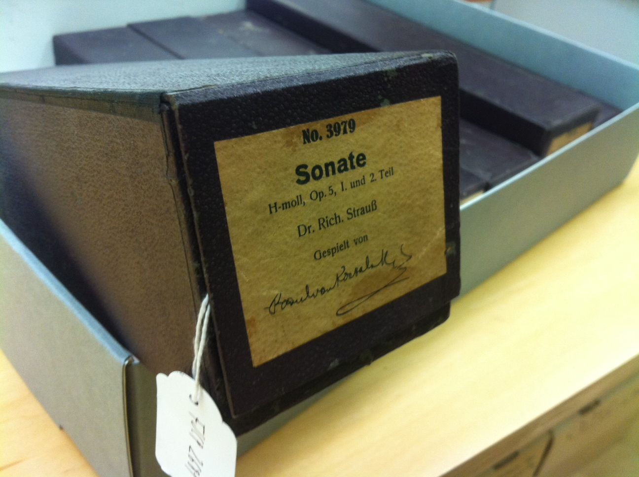 Sonate Richard Strauss